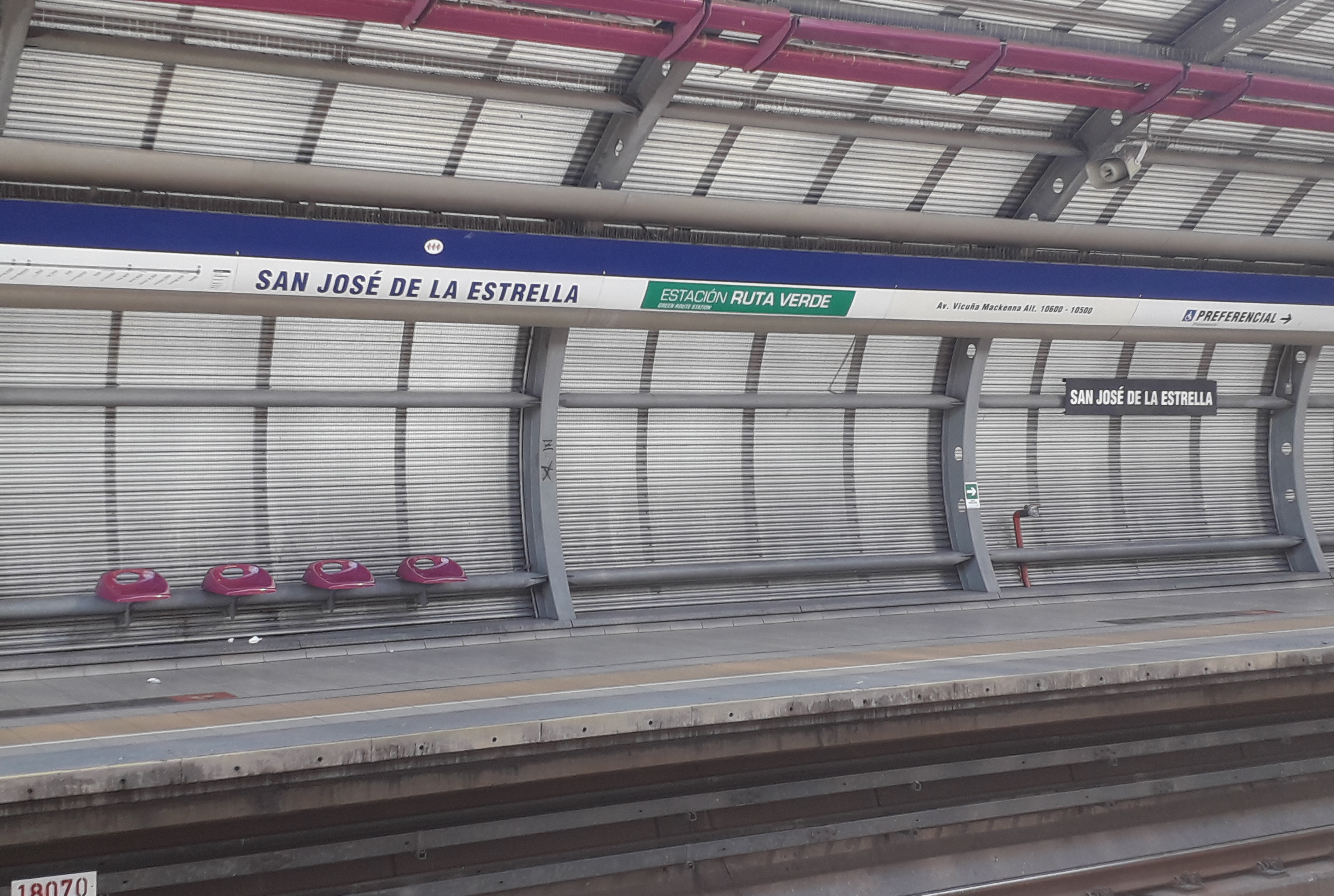 Estación San José de la Estrella de la Línea 4 del Metro de Santiago.